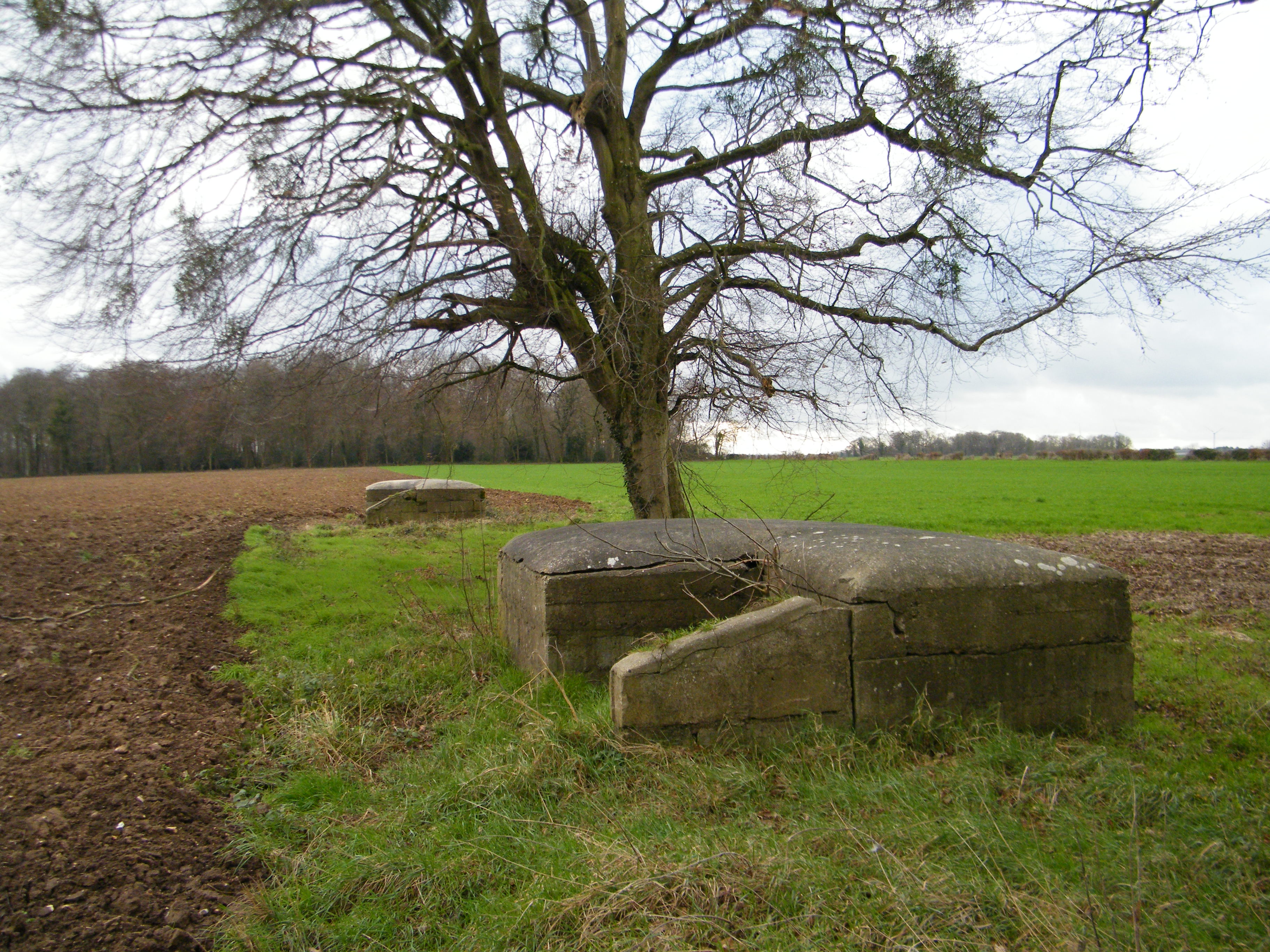 Avesnes-Chaussoy, Somme, Fr, site de lancement de V1.